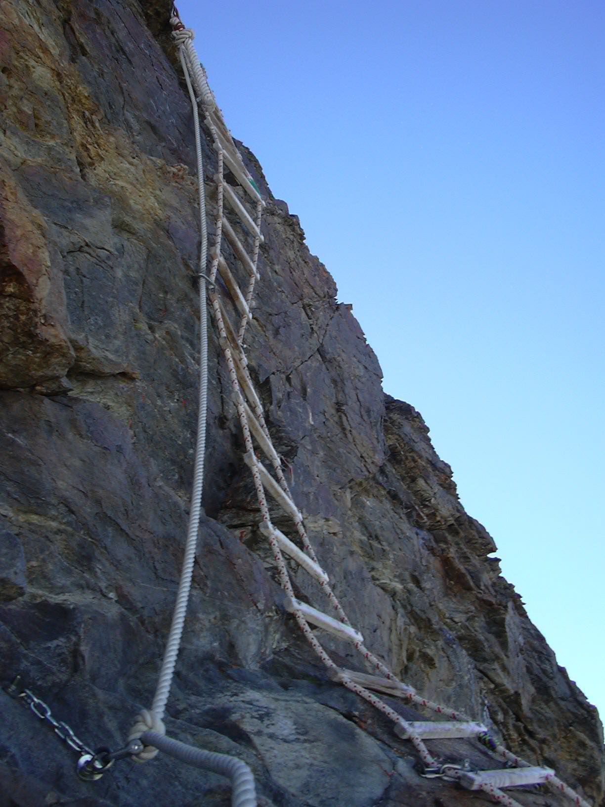 La mitica scala Jordan sulla cresta del Leone al Cervino